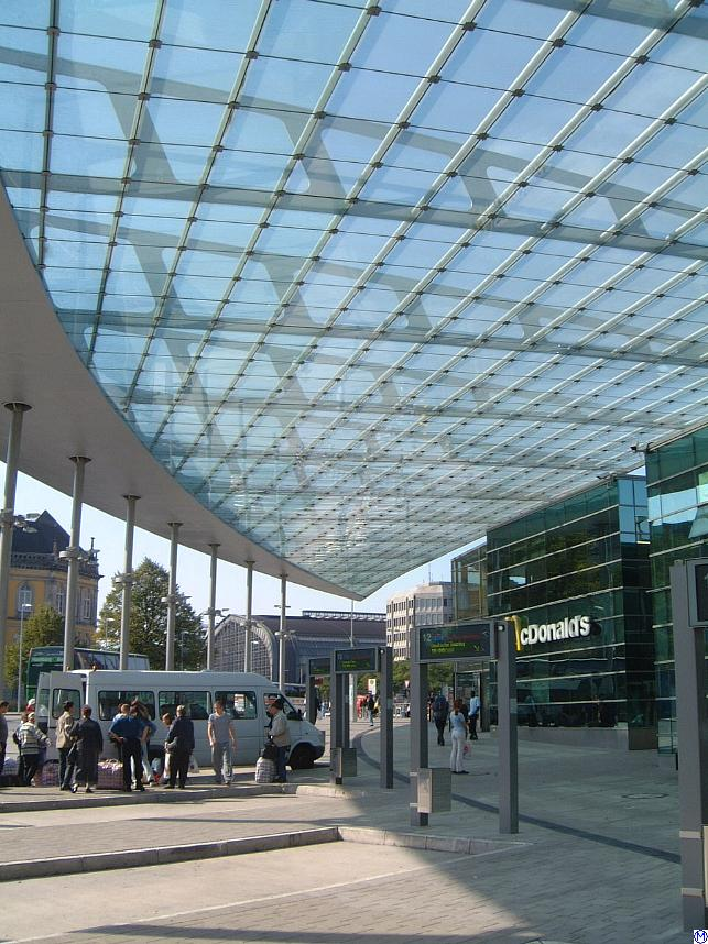 Zentraler Omnibusbahnhof in Hamburg, Sankt Georg